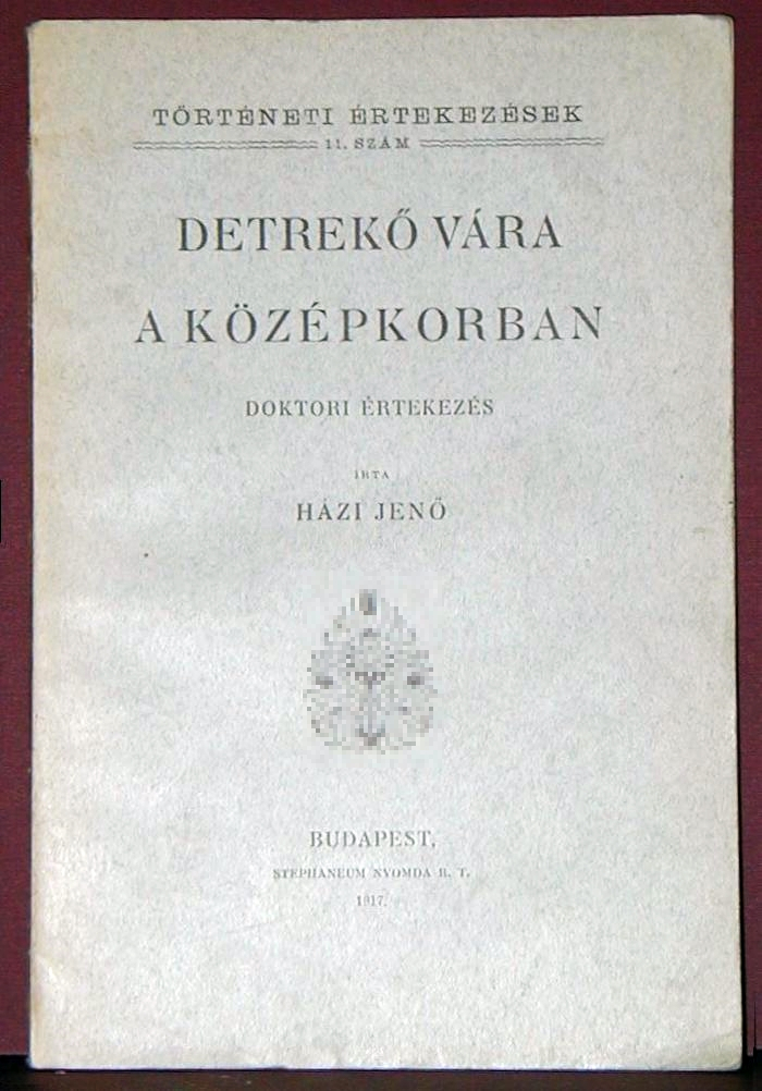 Házi Jenő: Detrekő vára a középkorban